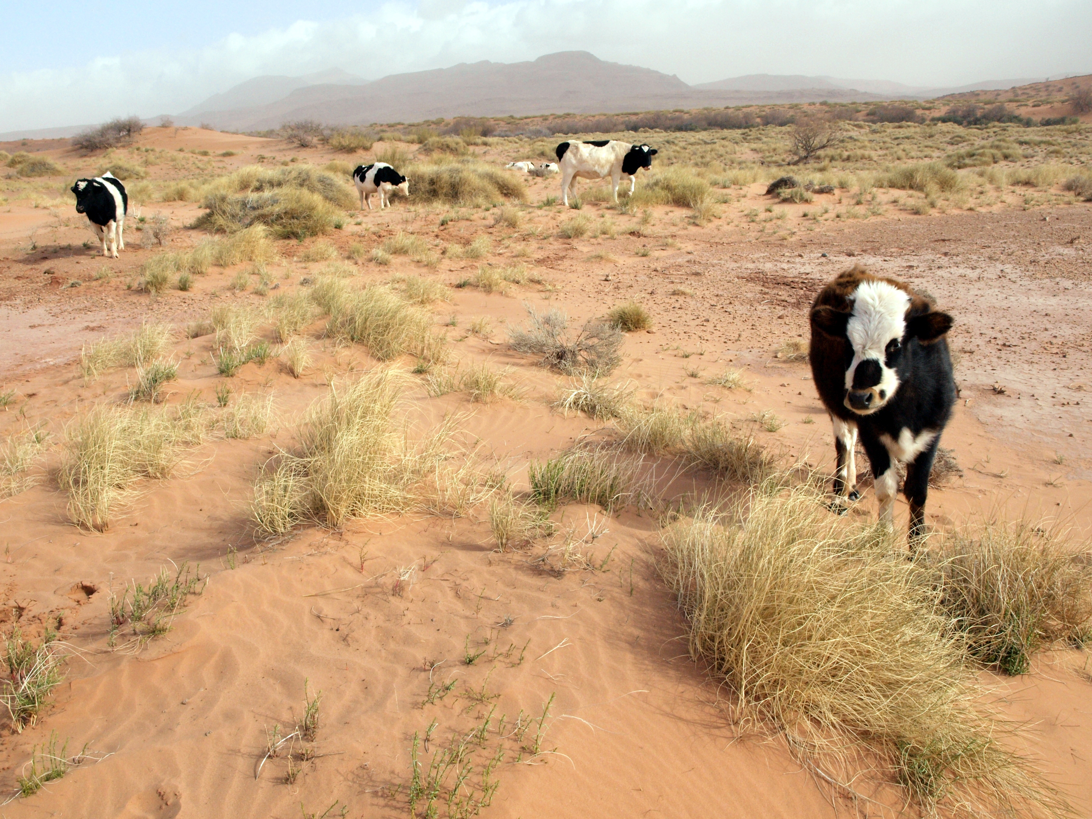 Vidutinių platumų pusdykumė Maroke